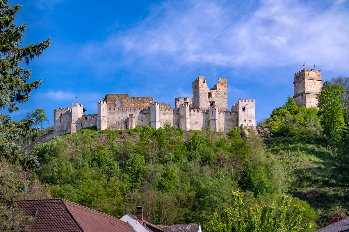 Burgruine Kirchschlag i.d.B.W. vom Ortskern gesehen (Mai 2016)